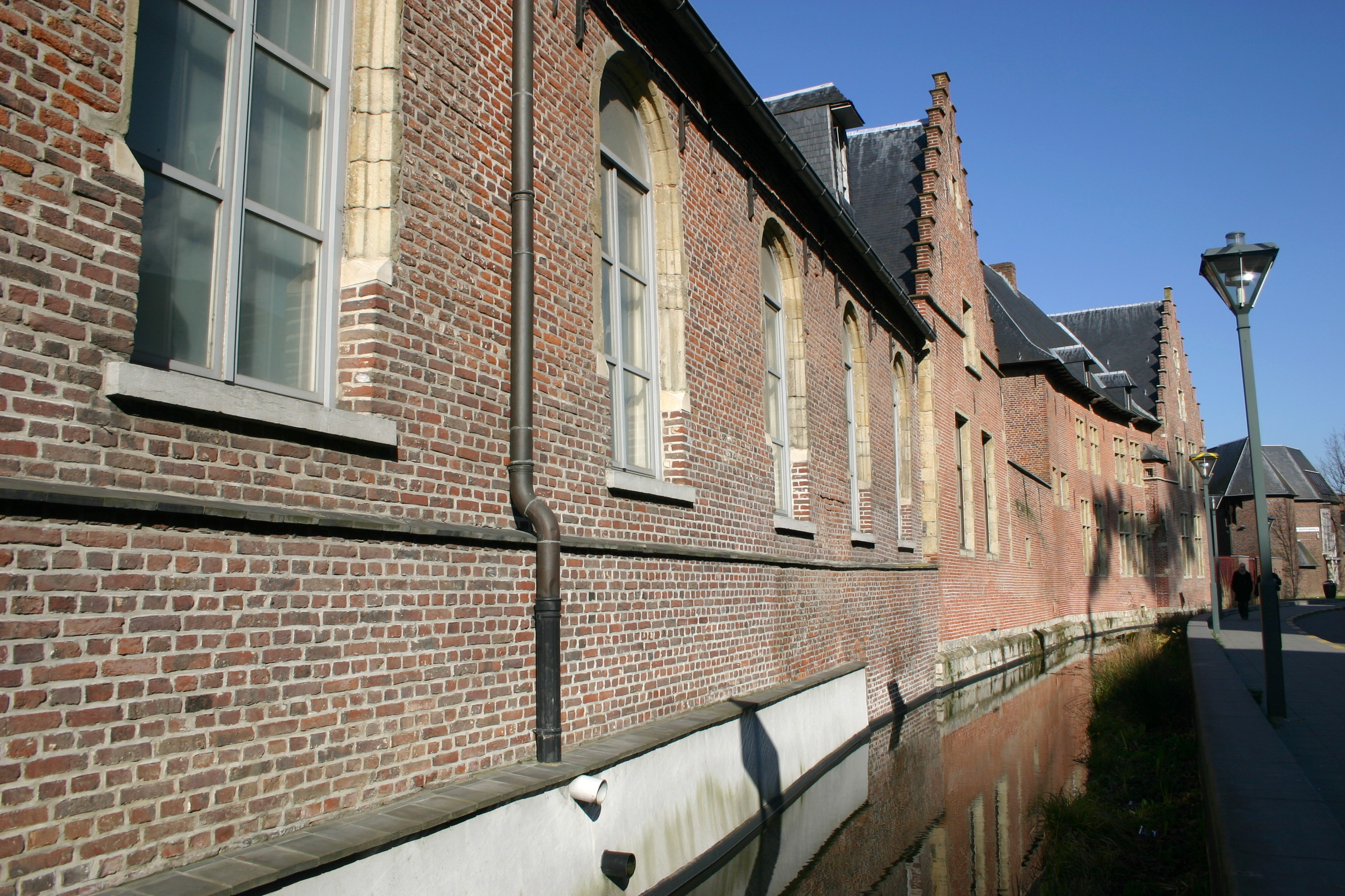 Zicht op het Oud Hospitaal (huidig stedelijk museum 't Gasthuys Aalst) aan de zijde van de huidige Burchtstraat